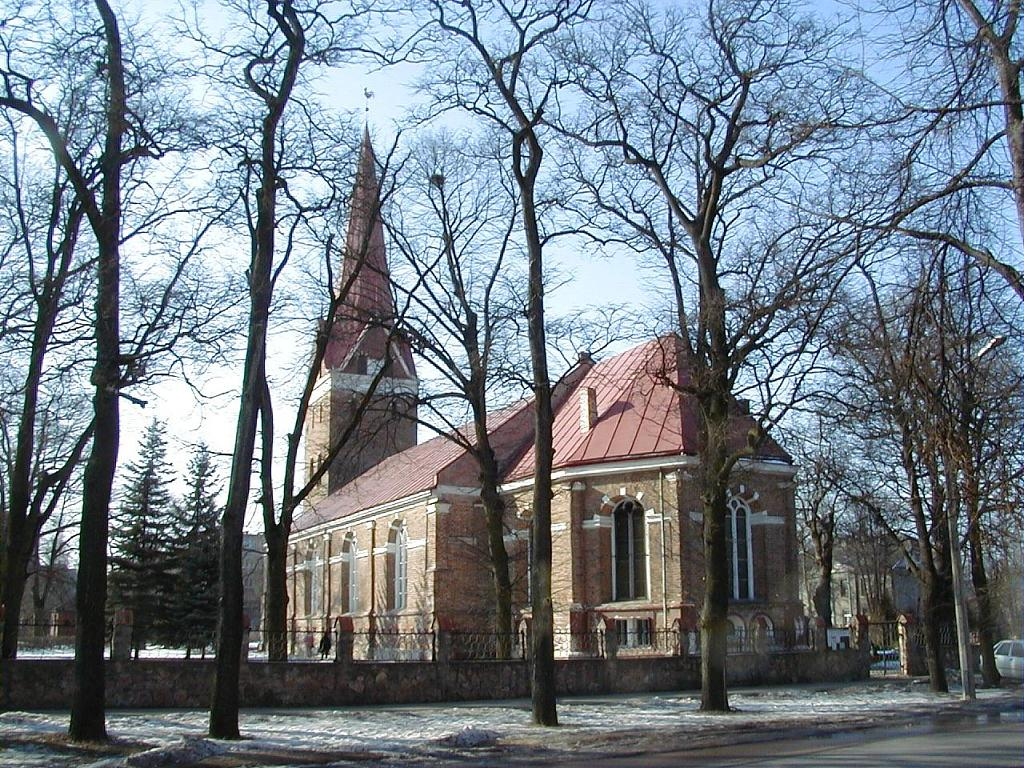 Jelgavas Sv. Annas luterāņu baznīca 2003-03-08